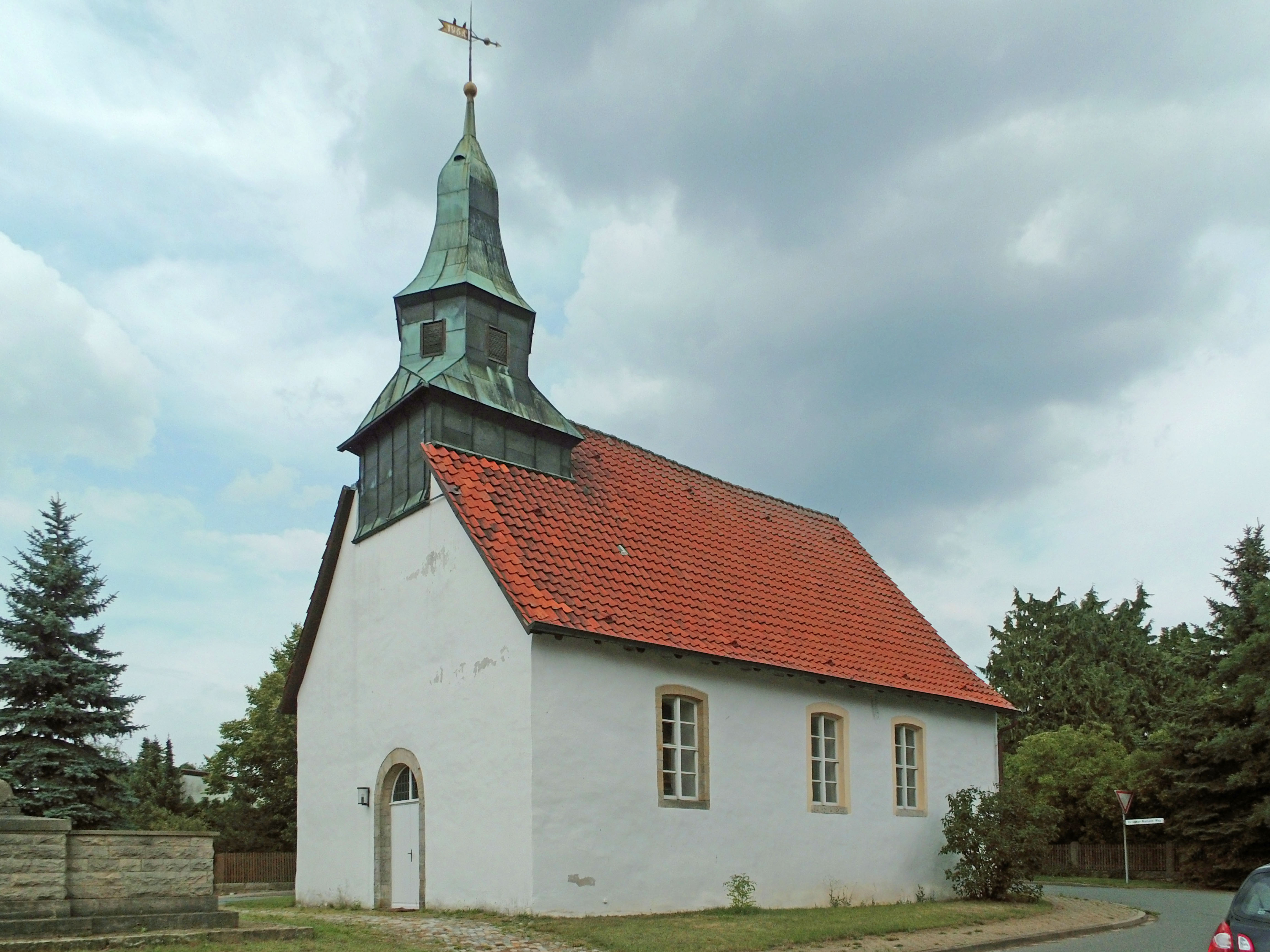 Evengelisch-lutherische St.-Stephans-Kirche in Rennau, Hasenwinkel (Landkreis Helmstedt).